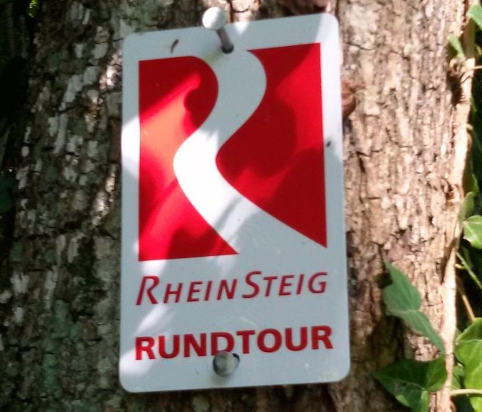 Wegweiser der Rheinsteig-Rundtour zwischen Rengsdorf und Leutesdorf.